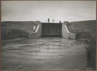 Boca Toma o Boca de la Zanja hacia 1910. Foto de Edward Jones Williams.